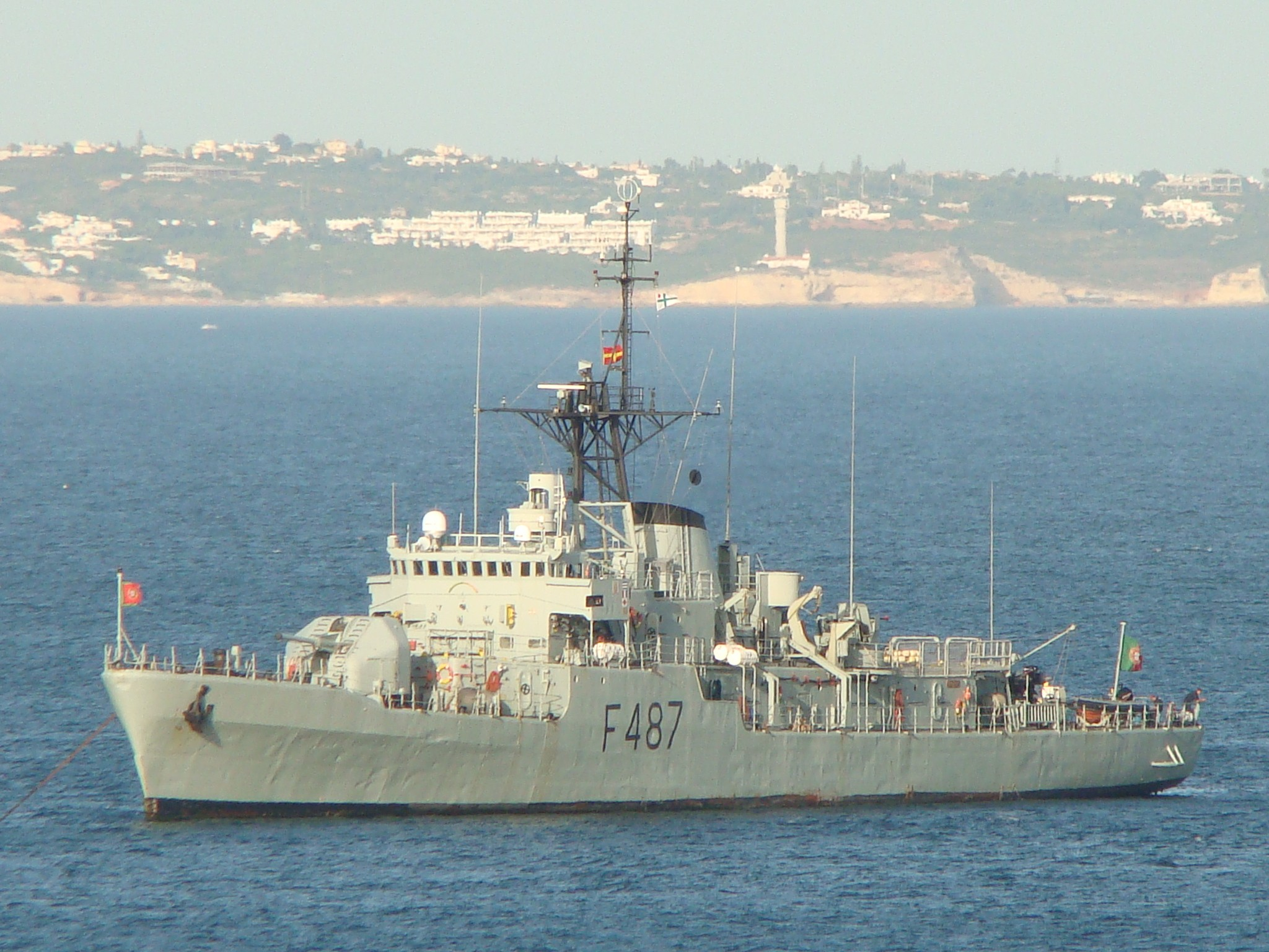 NRP João Roby (F487) da armada portuguesa.